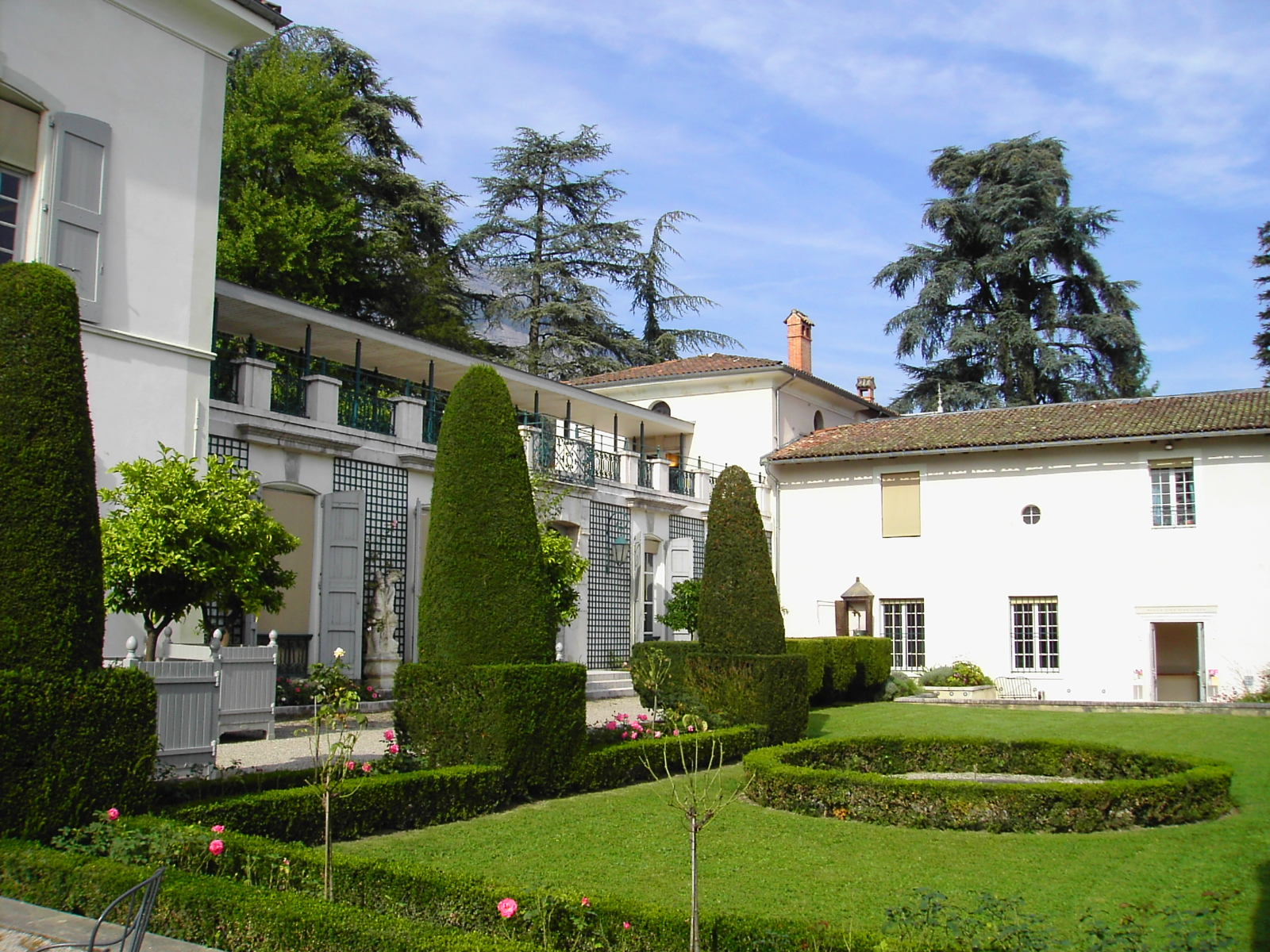 Musée Hébert. La Tronche (38)